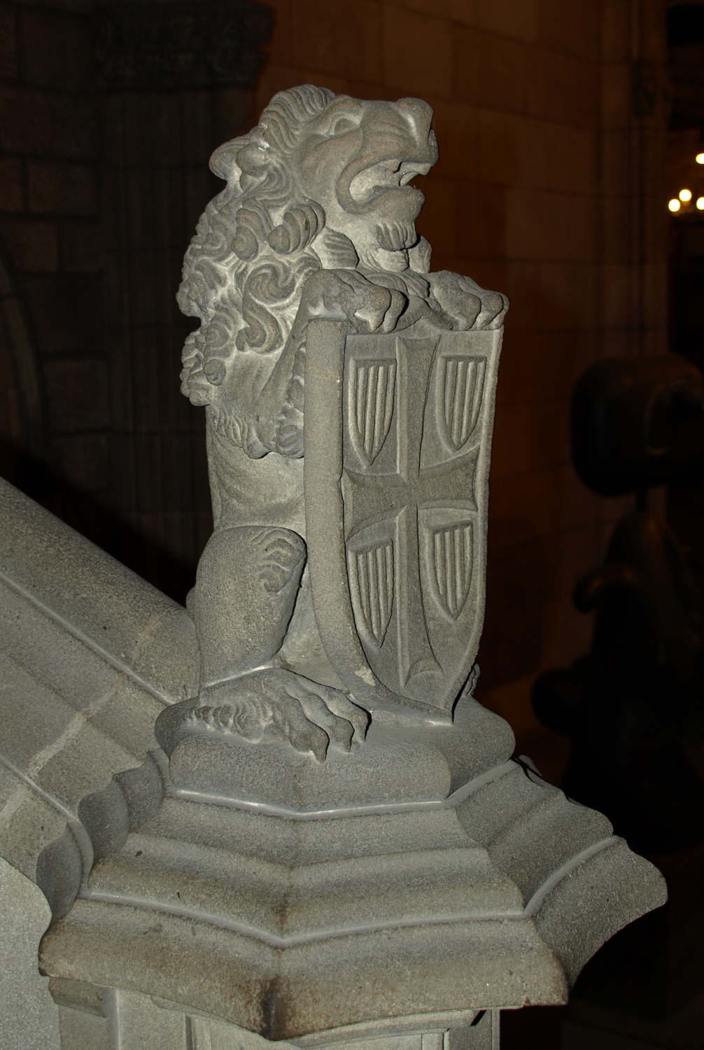 Escala Negra (Ajuntament de Barcelona)